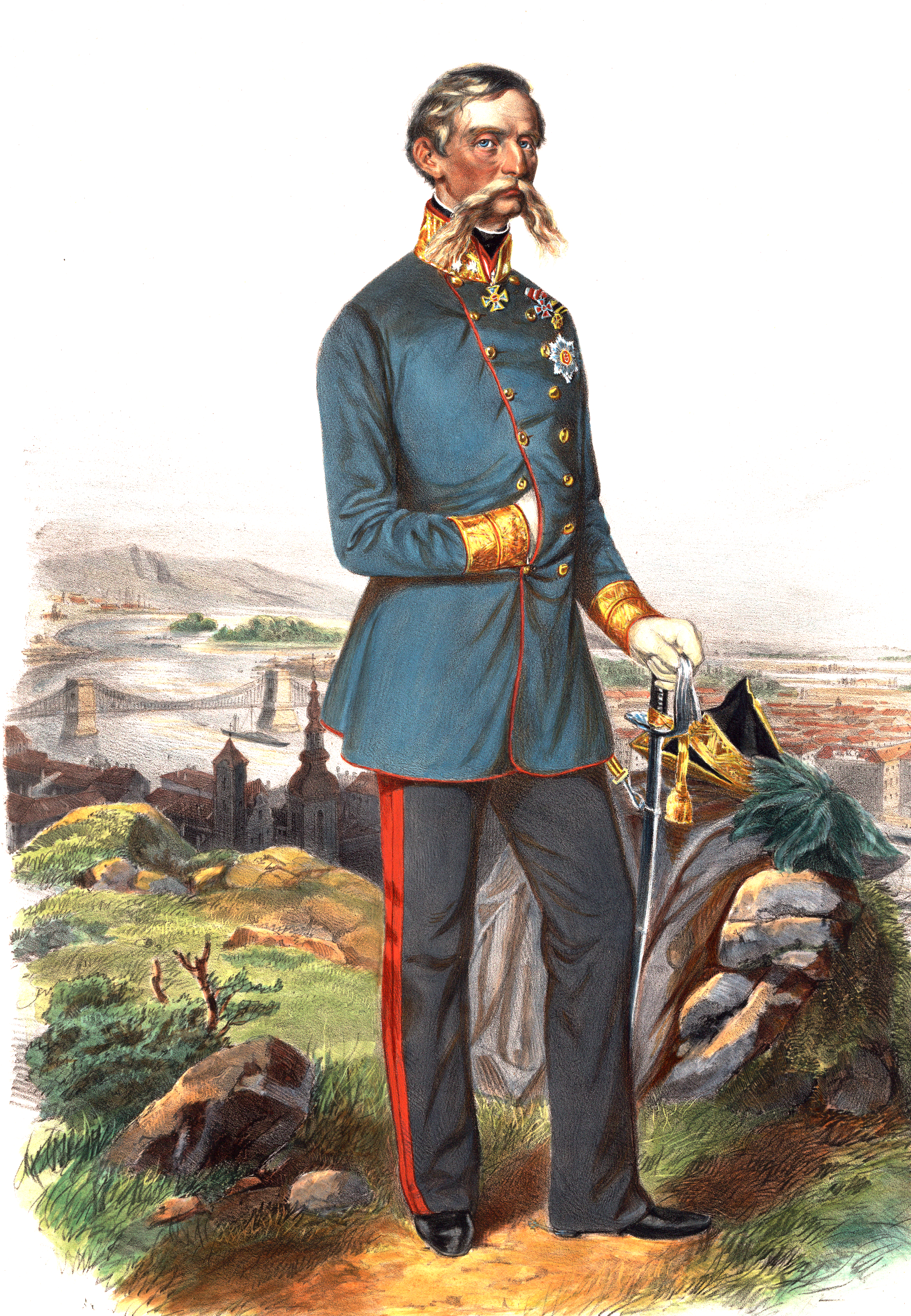 Báró Julius Jacob von Haynau (Kassel, Németország, 1786. október 14. – Bécs, 1853. március 14.) osztrák hadvezér